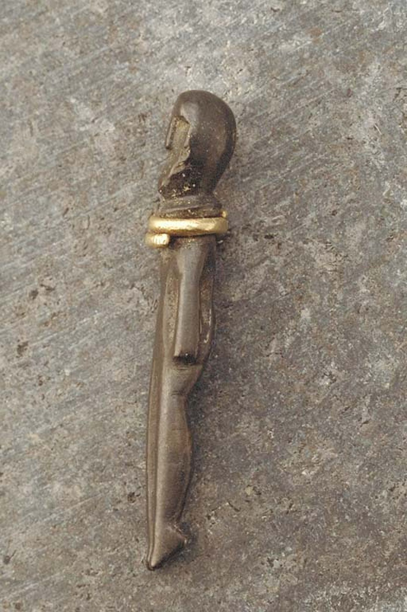 Kymbogubben från folkvandringstid